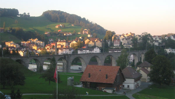 Herisau, September 2004 (leider in der Dämmerung)